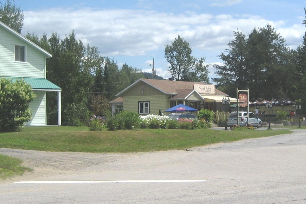 Ancienne école reconvertie en restaurant. Stoneham Qc Canada